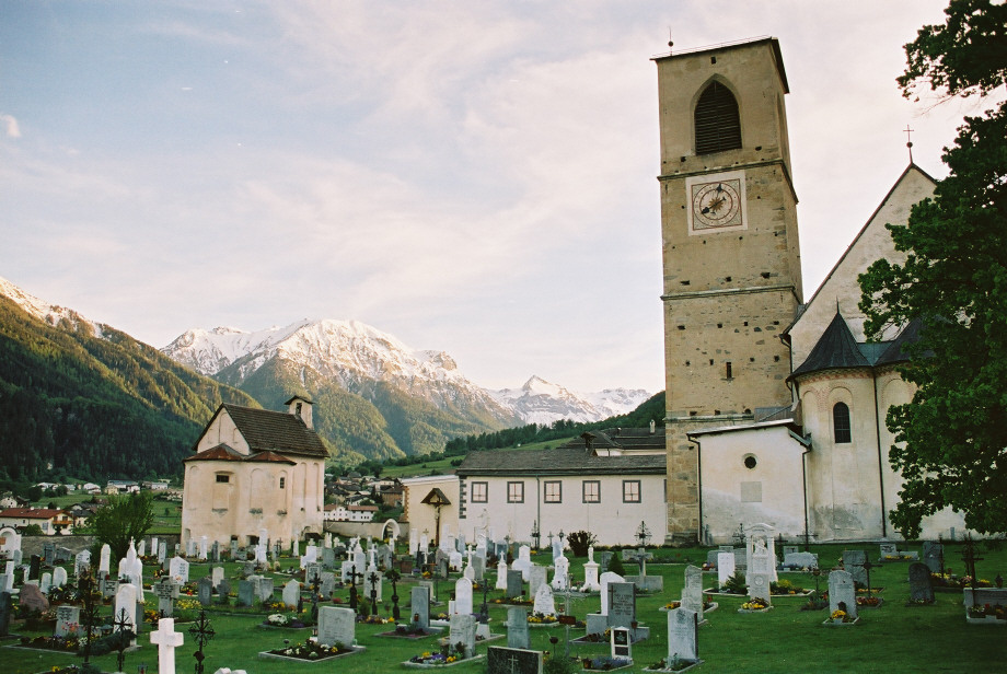 Benediktinerkloster St. Johann, Müstair